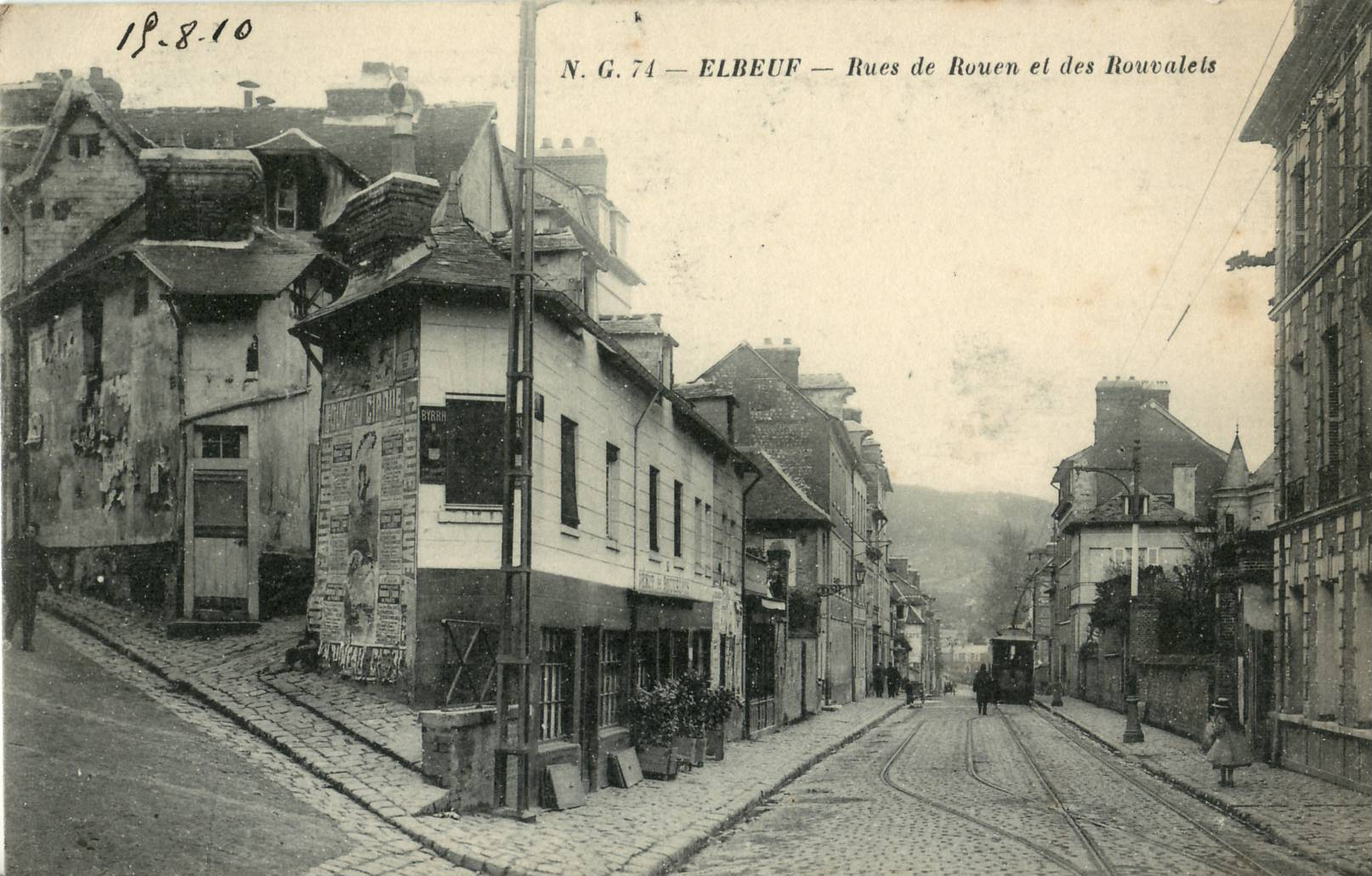 Carte postale ancienne éditée par NG, n°74 : ELBEUF - Rues de Rouen et des Rouvalets